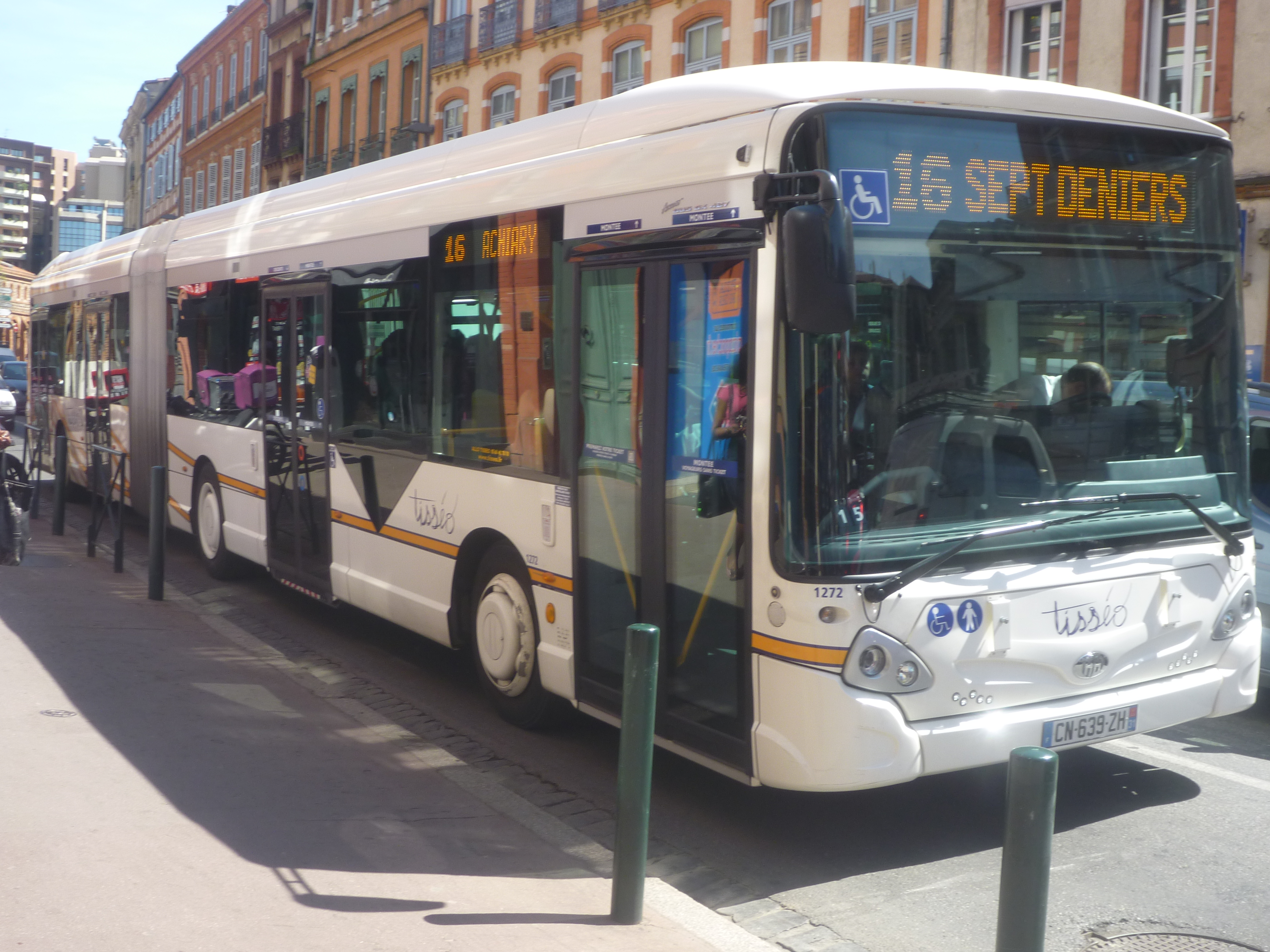 Bus tisséo nouvelle sérigraphie 2013 à françois verdier, ligne 16, Toulouse